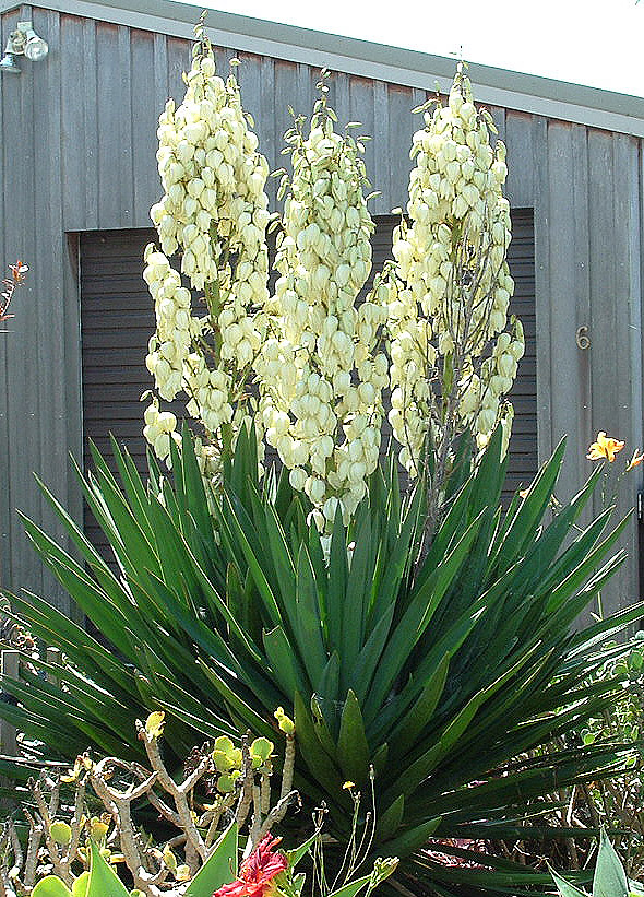 Superb spiking of yukka filamentosa near Kerikeri, New Zealand